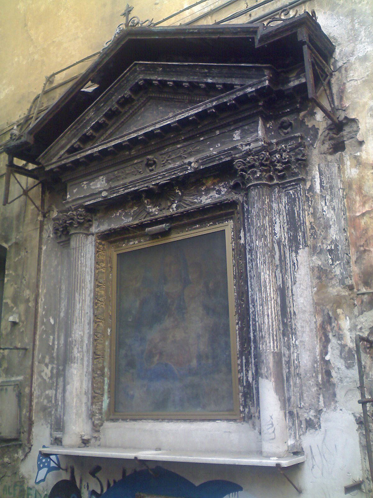 Edicola Sacra di Napoli